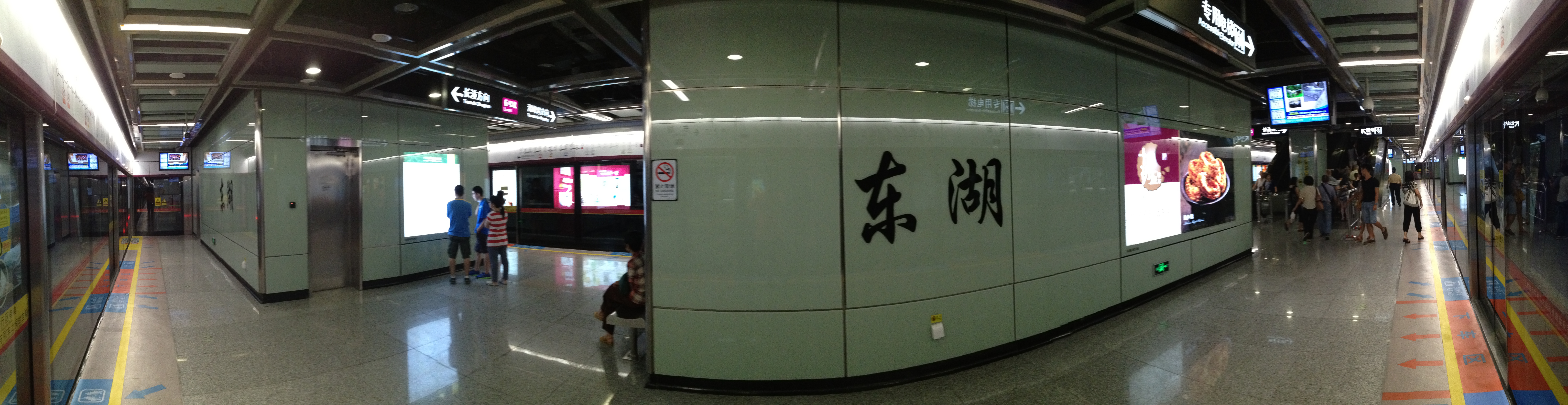 广州地铁东湖站月台全景图